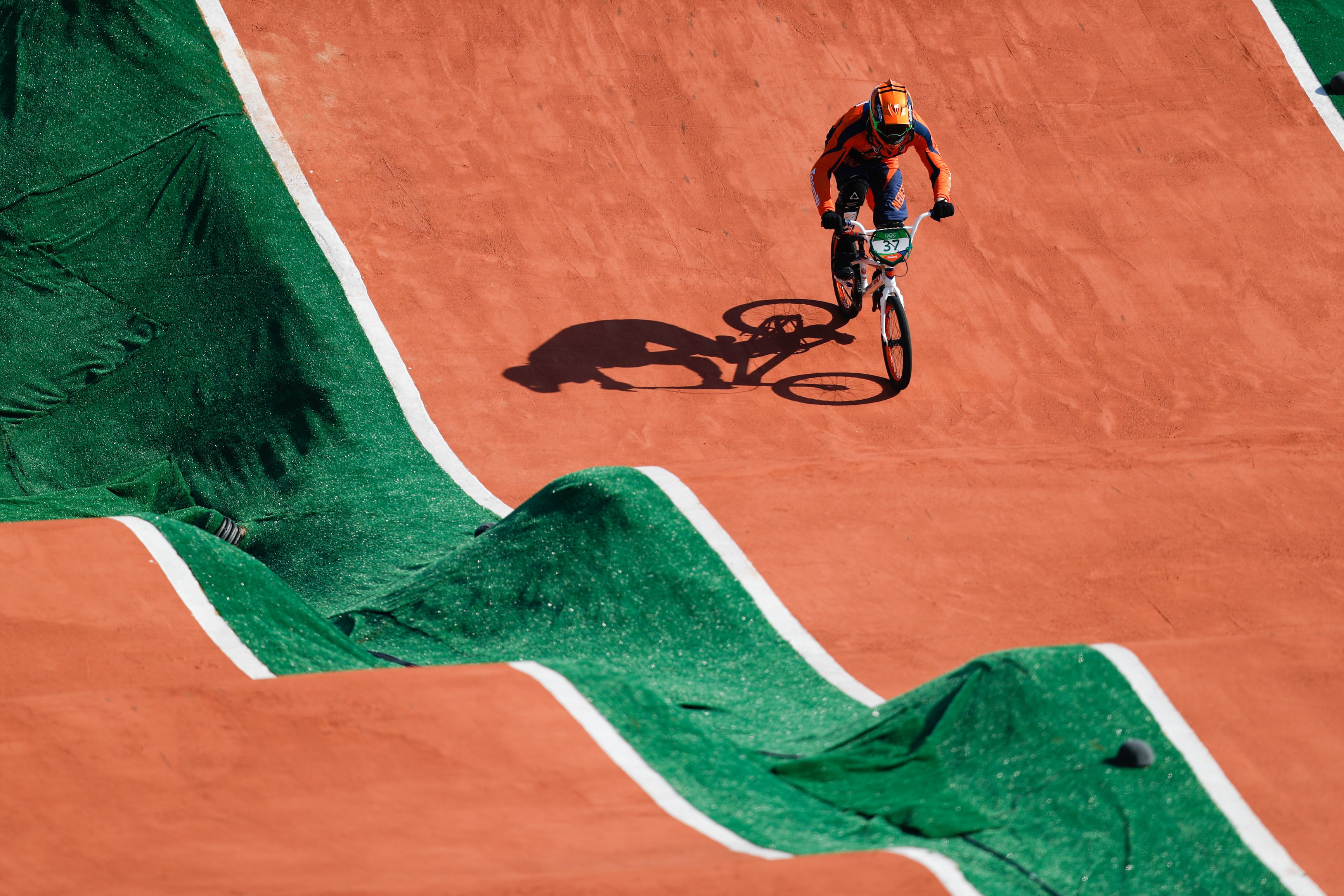 Rio de Janeiro - Ciclista holandês Jelle van Gorkom compete BMX nos Jogos Olímpicos Rio 2016, no Parque Radical em Deodoro (Fernando Frazão/Agência Brasil)